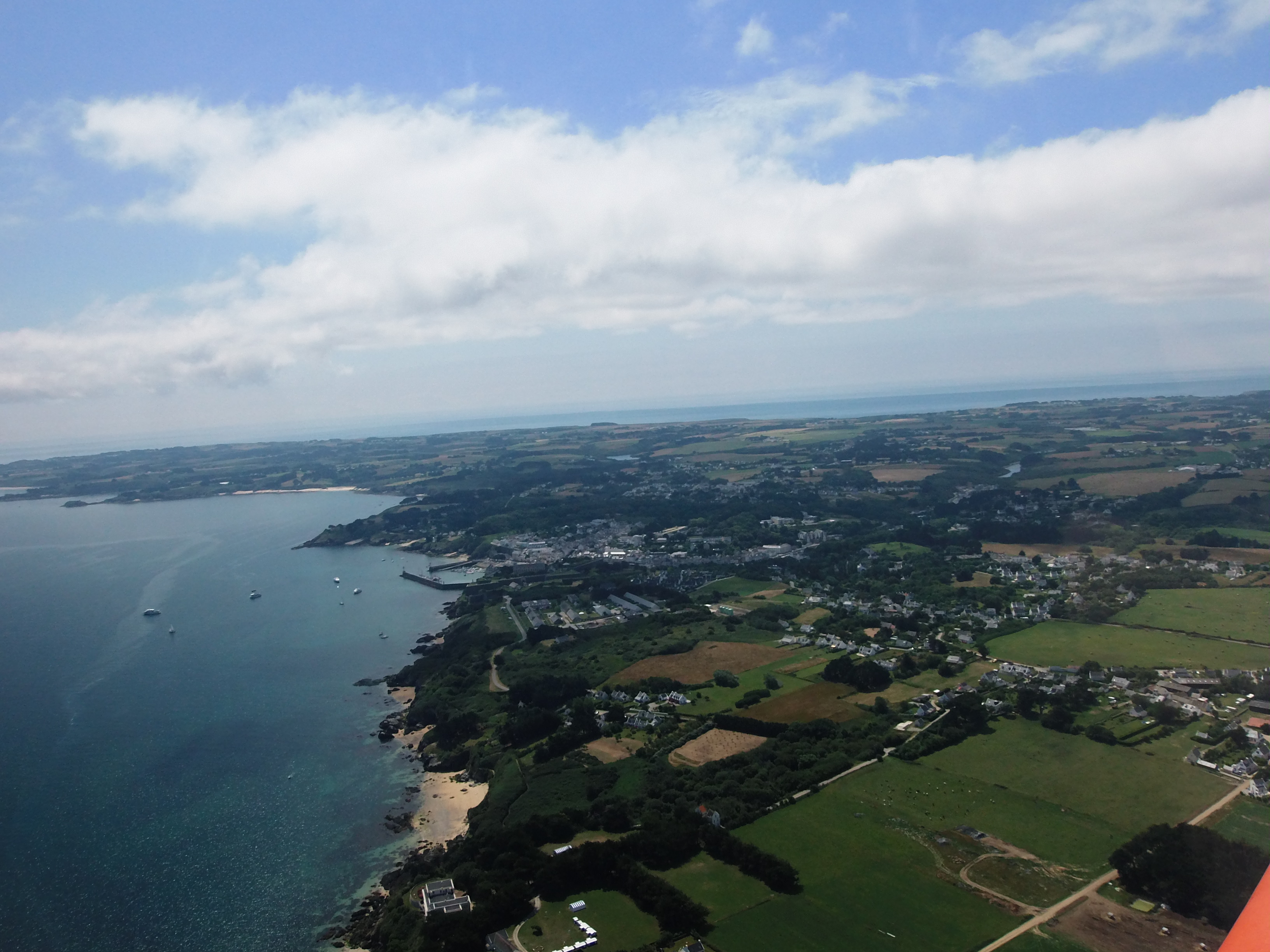 Le Palais (Morbihan, France), dont on aperçoit l'entrée du port et la citadelle Vauban. Vue orientée du Nord vers le Sud, vue d'avion, juillet 2014. La commune de Le Palais se trouve à l'est de Belle-Île-en-Mer. Coordonnées 47° 21′ Nord - 3° 09′ Ouest. Voir aussi Locmaria vue d'avion et en 2015.